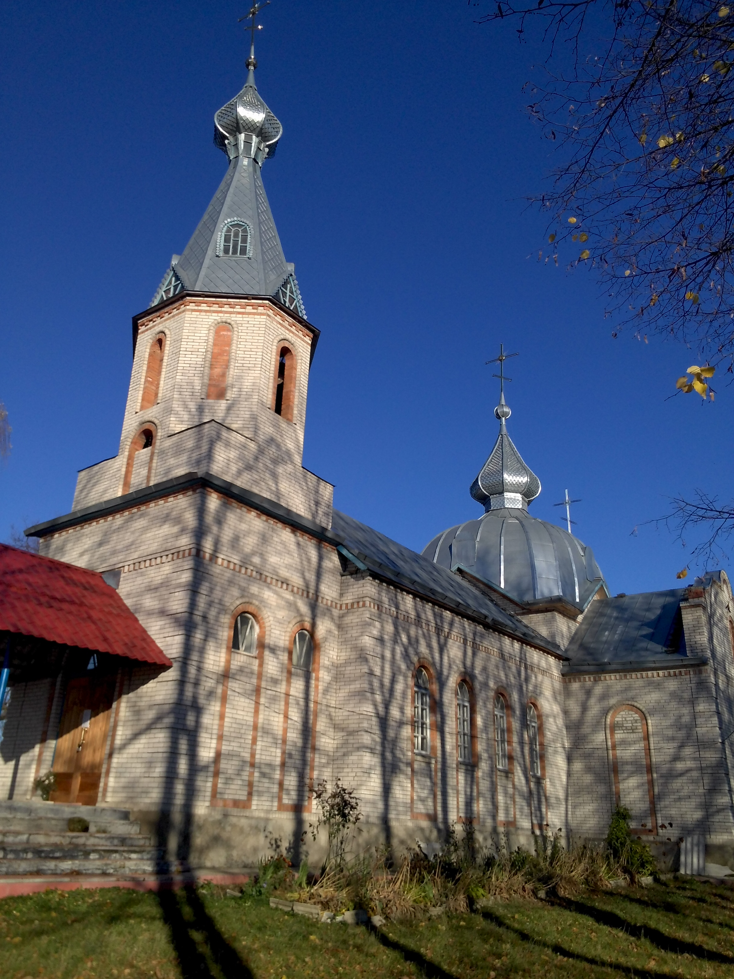 с. Росоша. Храм Св. Дмитрія Солунського